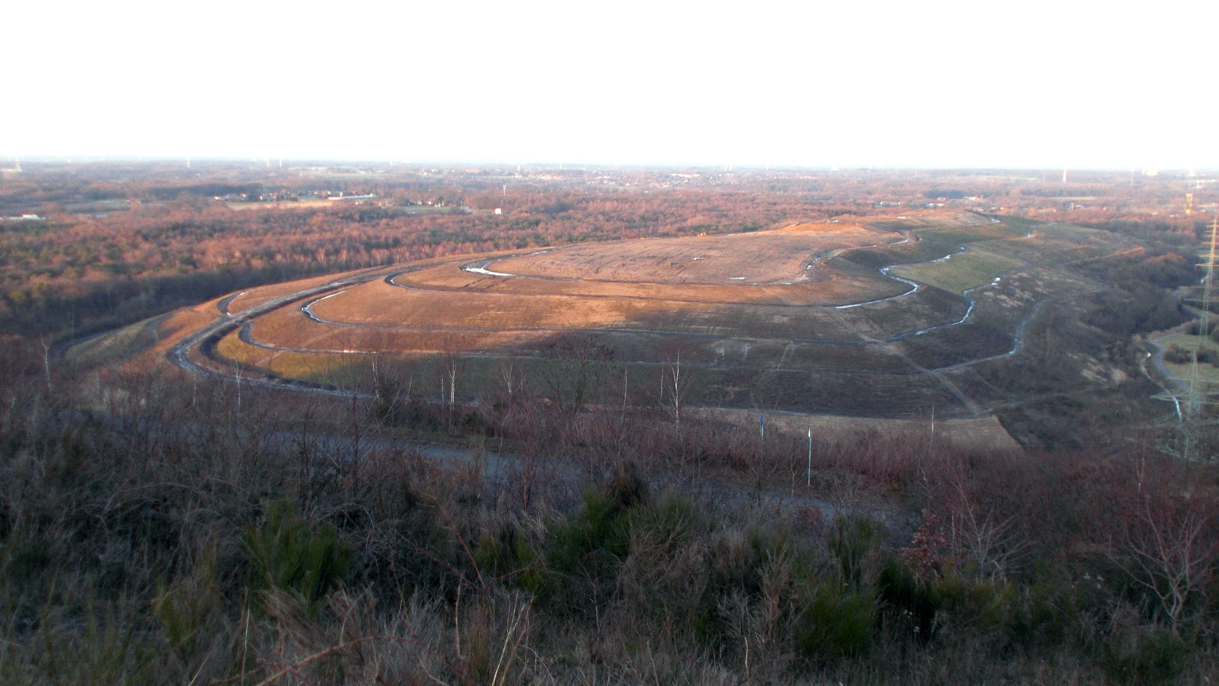 Halde Schöttelheide in Bottrop-Grafenwald an der ehemaligen Zeche Prosper-Haniel.